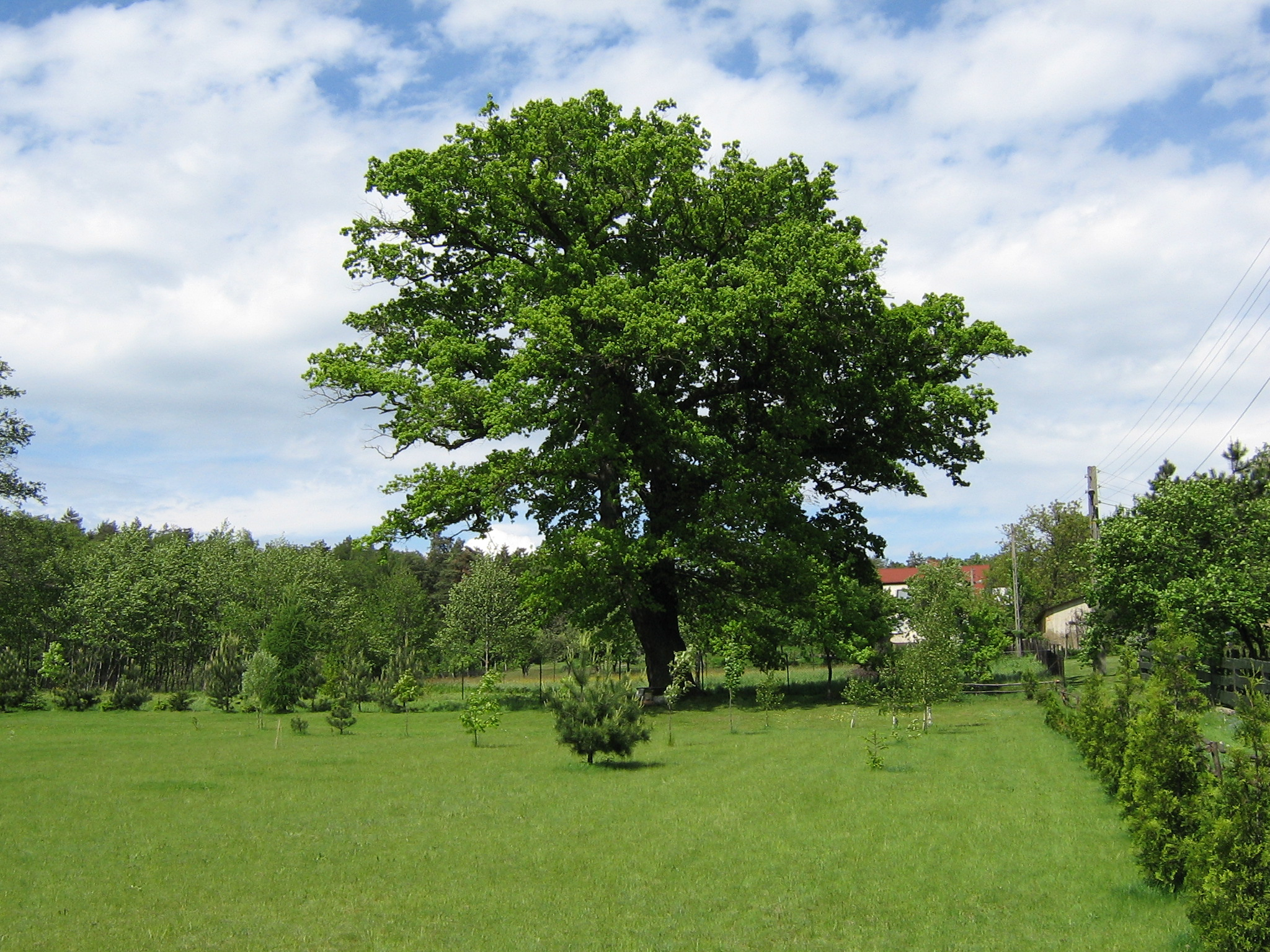 Dwustu letni dąb w Górkach Śląskich